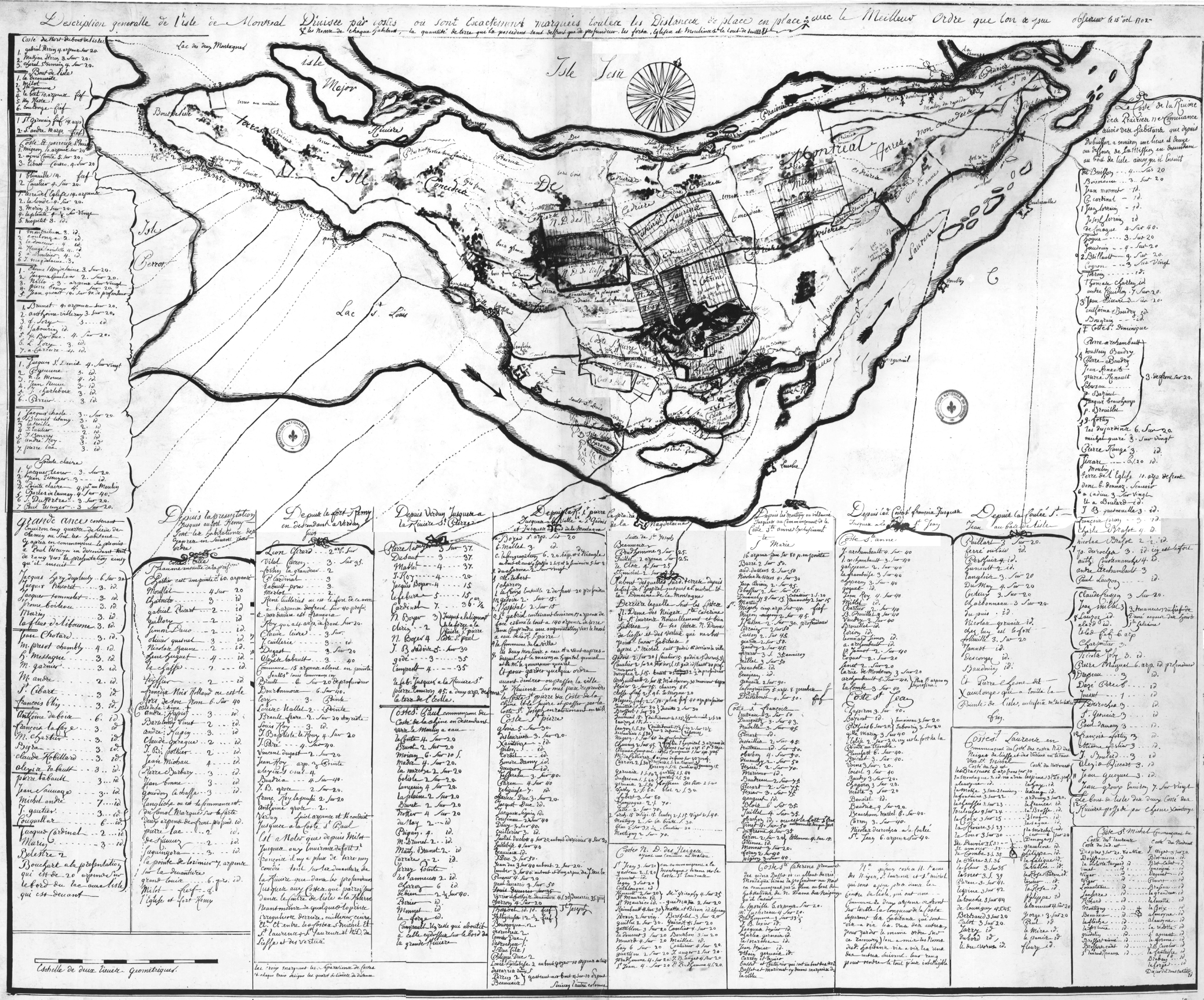 Description généralle de l'isle de Montreal divisée par costes où sont exactement marquées toutes les distances de place en place avec le meilleur ordre que l'on a pu observer, 1 carte en 4 coupures : manuscrite ; 71 x 91 cm